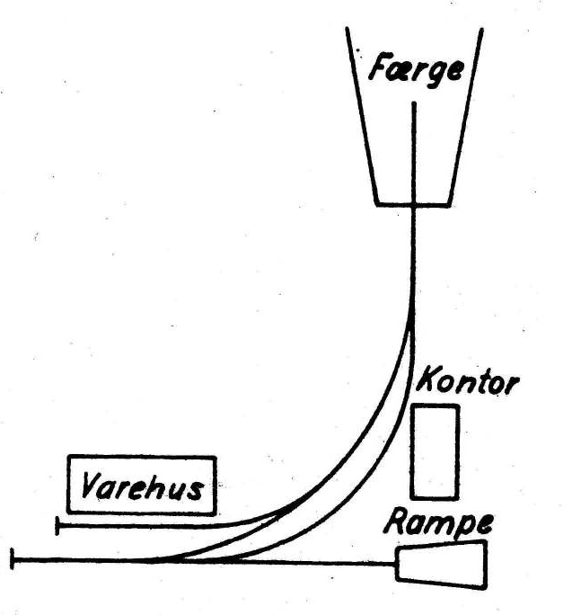 Gleisplan Ærø